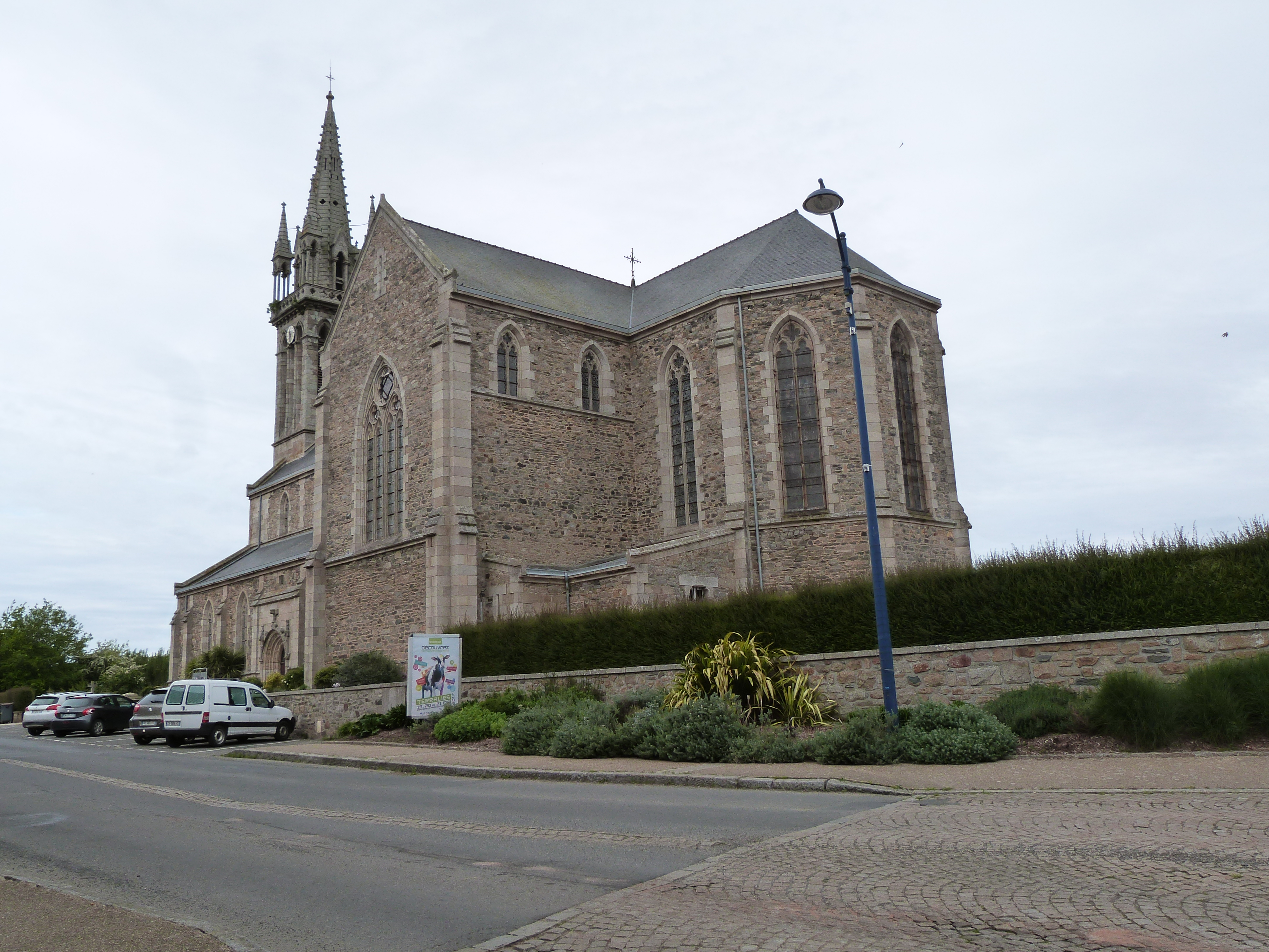 Vue générale (sud-est) de l'église Notre-Dame de Plouguiel